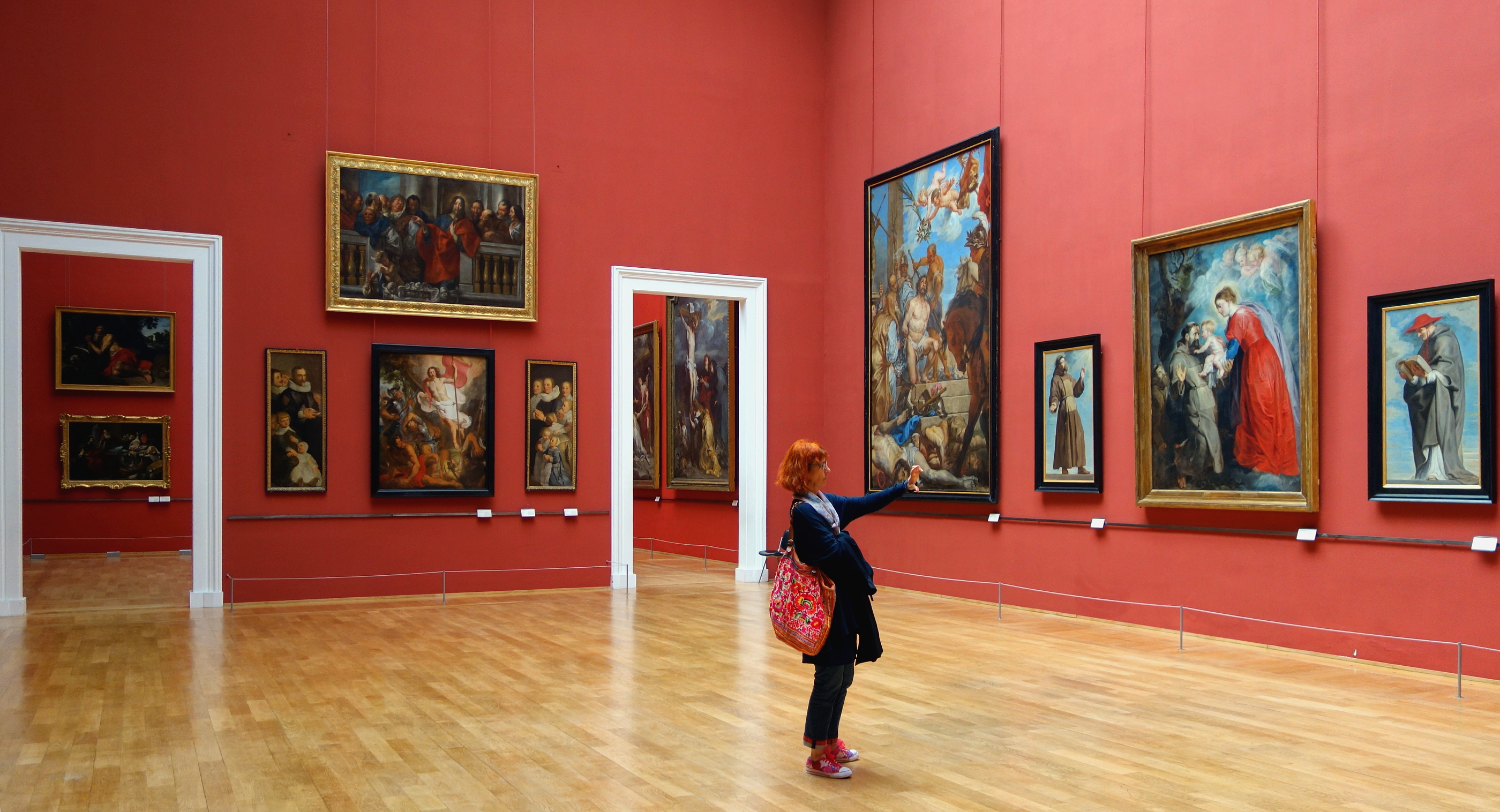 Vue de la salle 3 du département de peinture du Palais des beaux-arts de Lille.